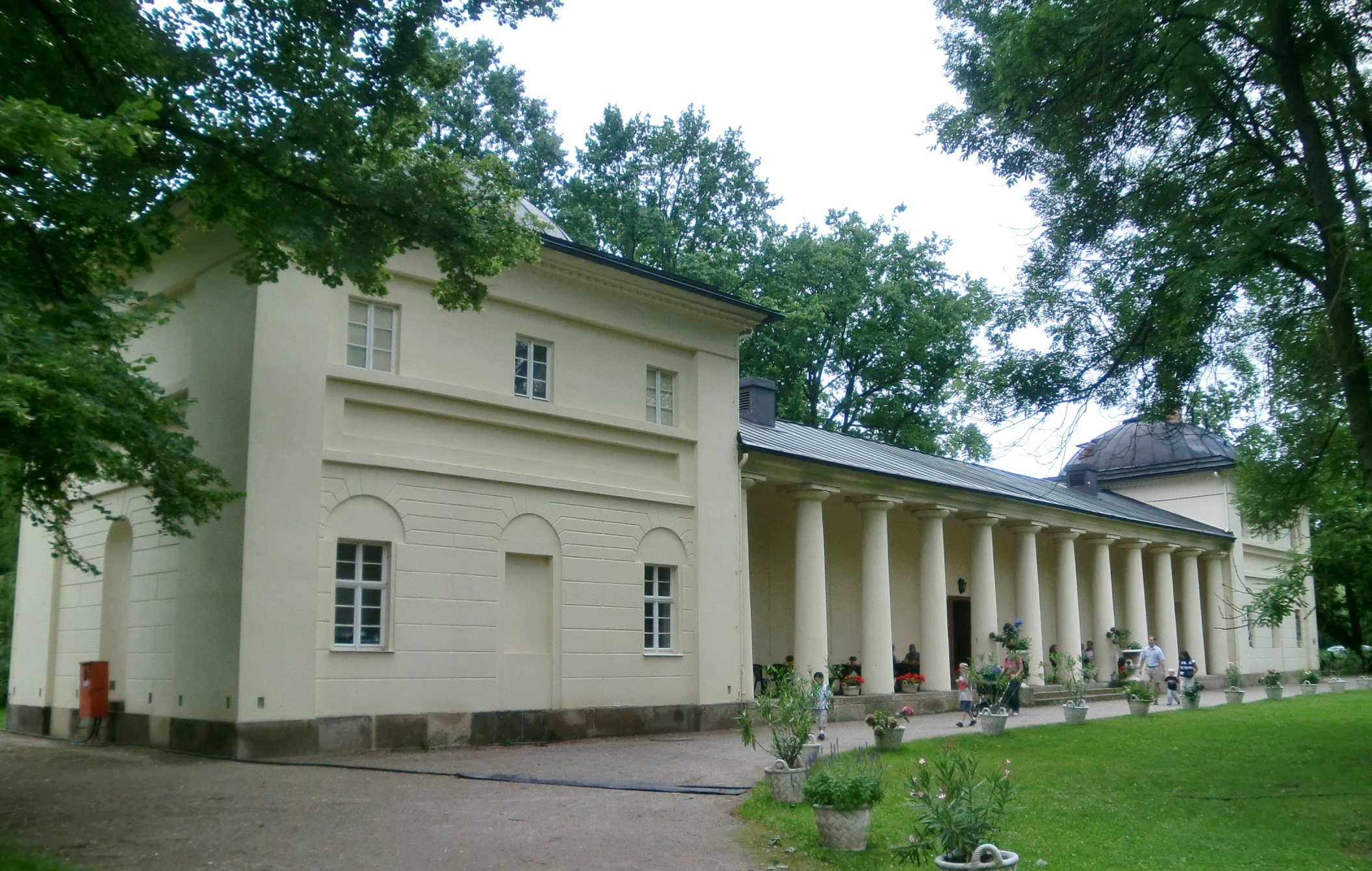 Orangerie im Schloss Lübbenau, Parkseite